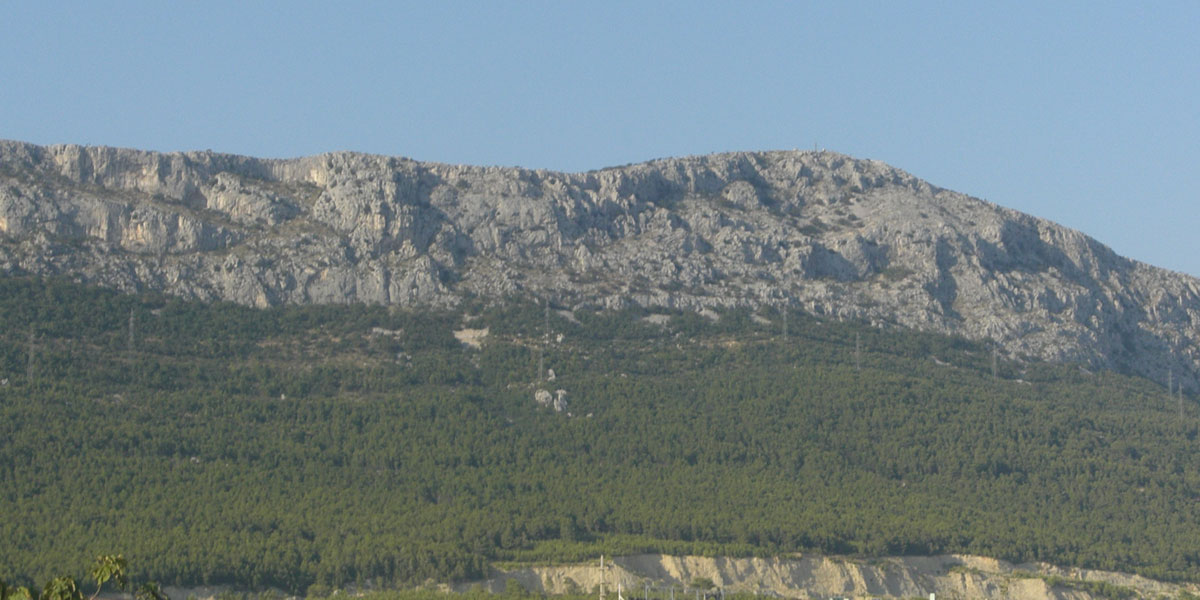 Kozjak iz Kastela